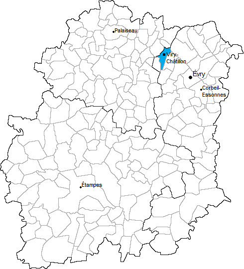 Carte de situation du canton de Viry-Châtillon en Essonne (91)